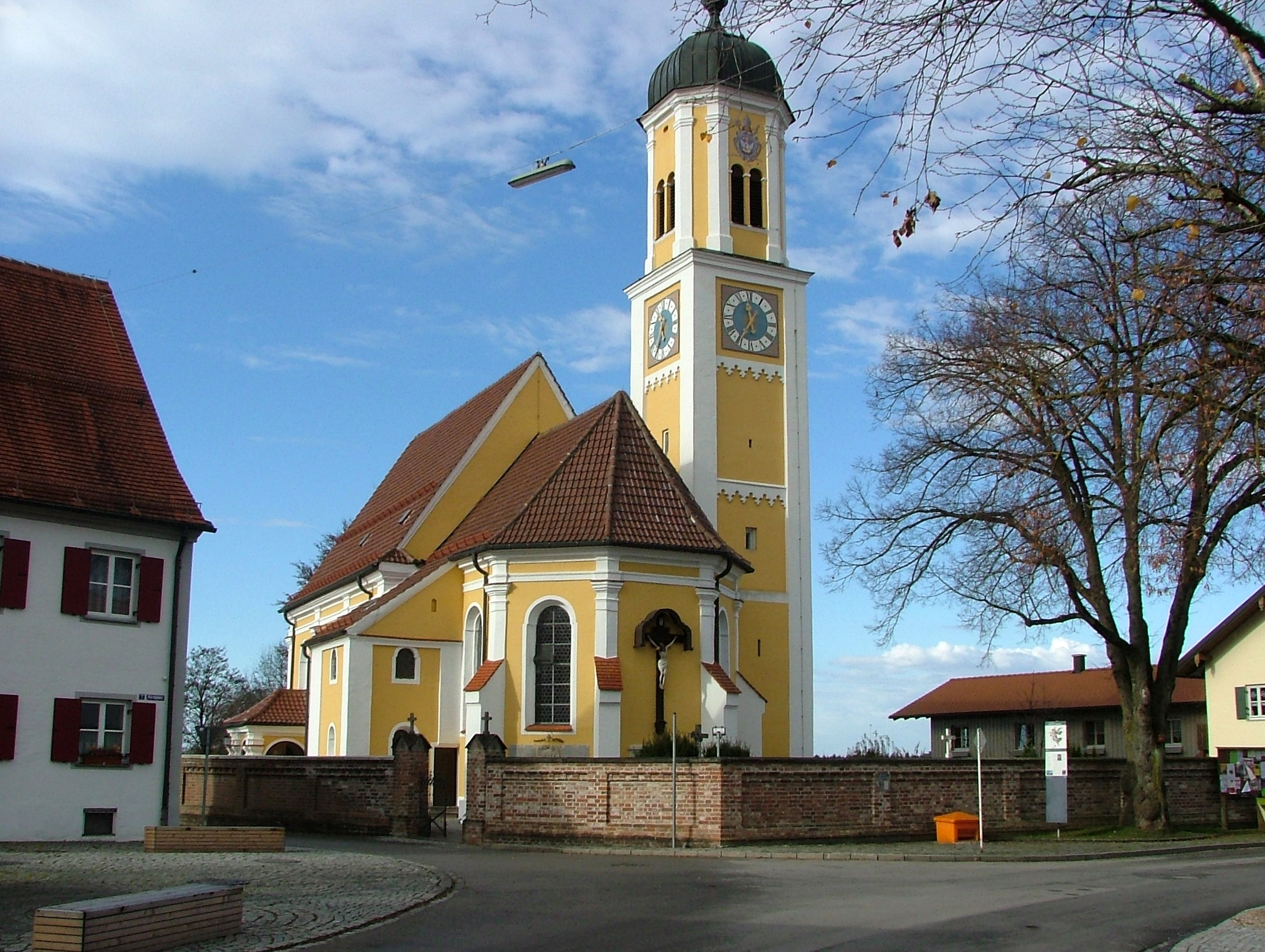 St. Vitus, Mauerstetten